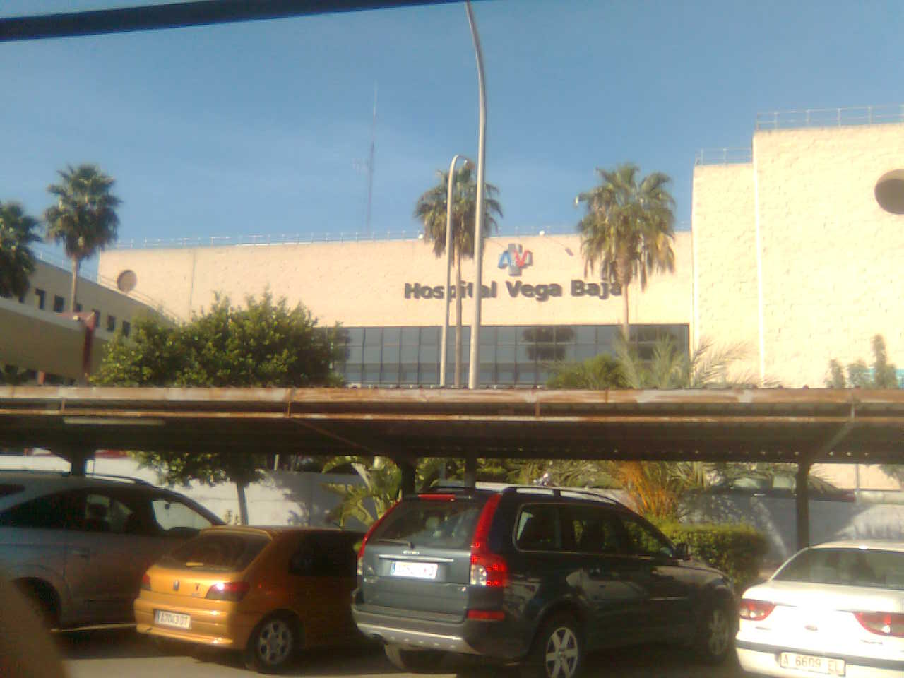 Hospital Vega Baja de Orihuela, C.Valenciana, España